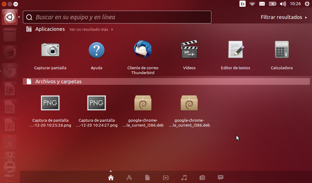 Pantallazo del Buscador de Programas en Ubuntu 13.10 Saucy Usuario: K@RITO